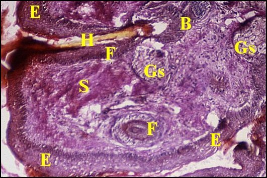 Poils et glandes sébacées hétérotopiques dans l'oreille moyenne.